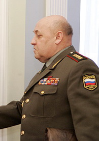 Юрий Николаевич Балуевский